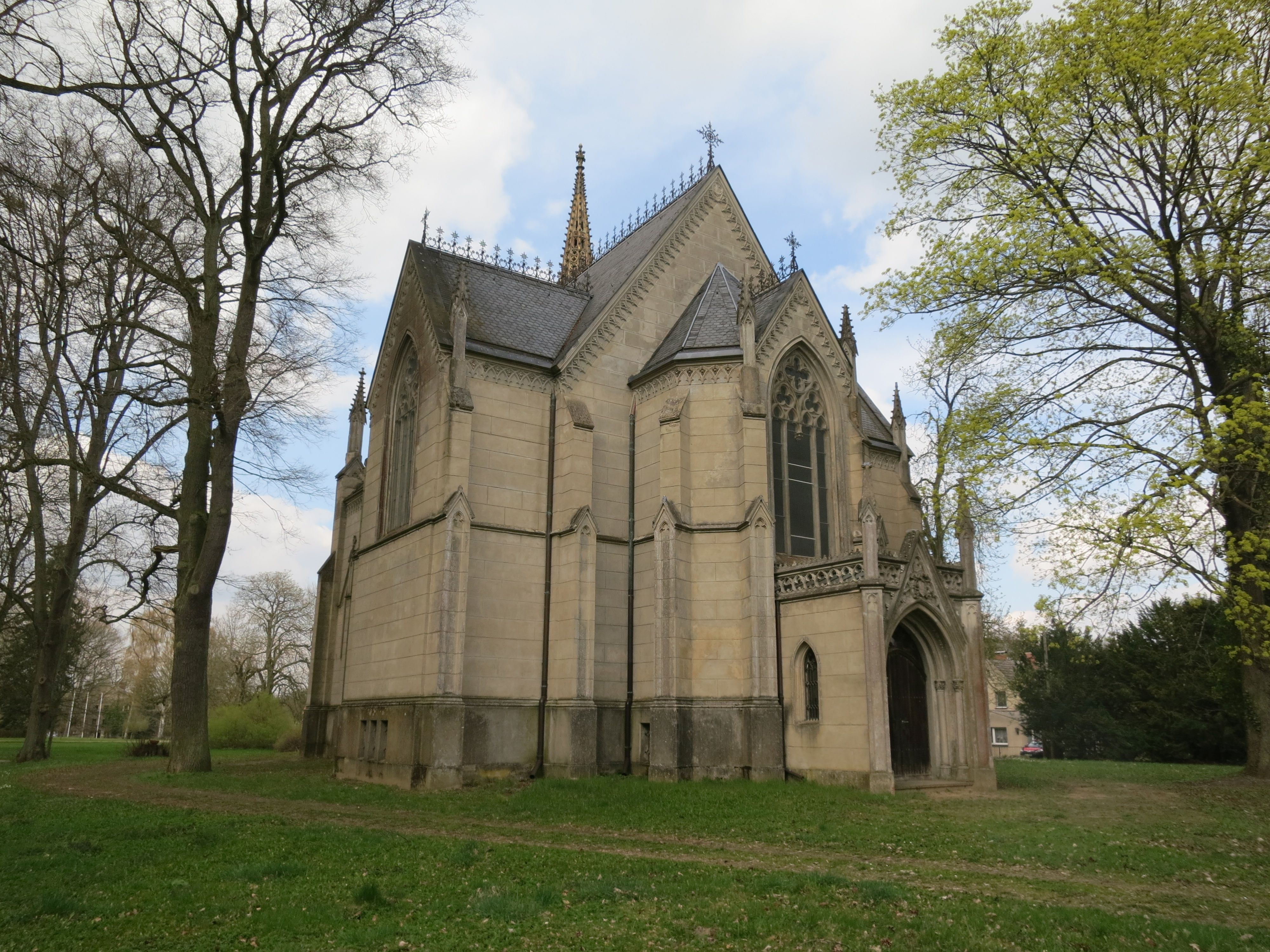 Kröchlendorff, Schlosskirche von Südost